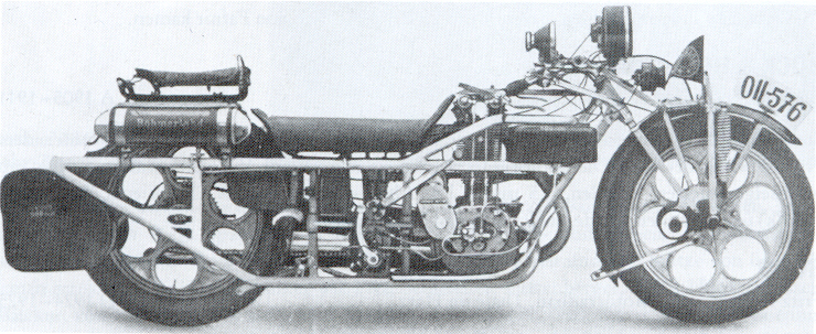 Advertentie uit 1928 van een niet meer bestaand bedrijf